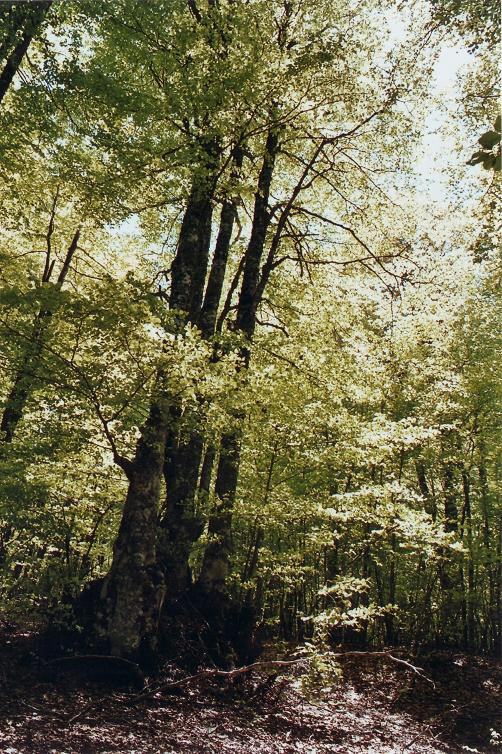 Foto di Bruno Francesco Pileggi